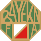 Logo Bayernu w latach 1906-1919